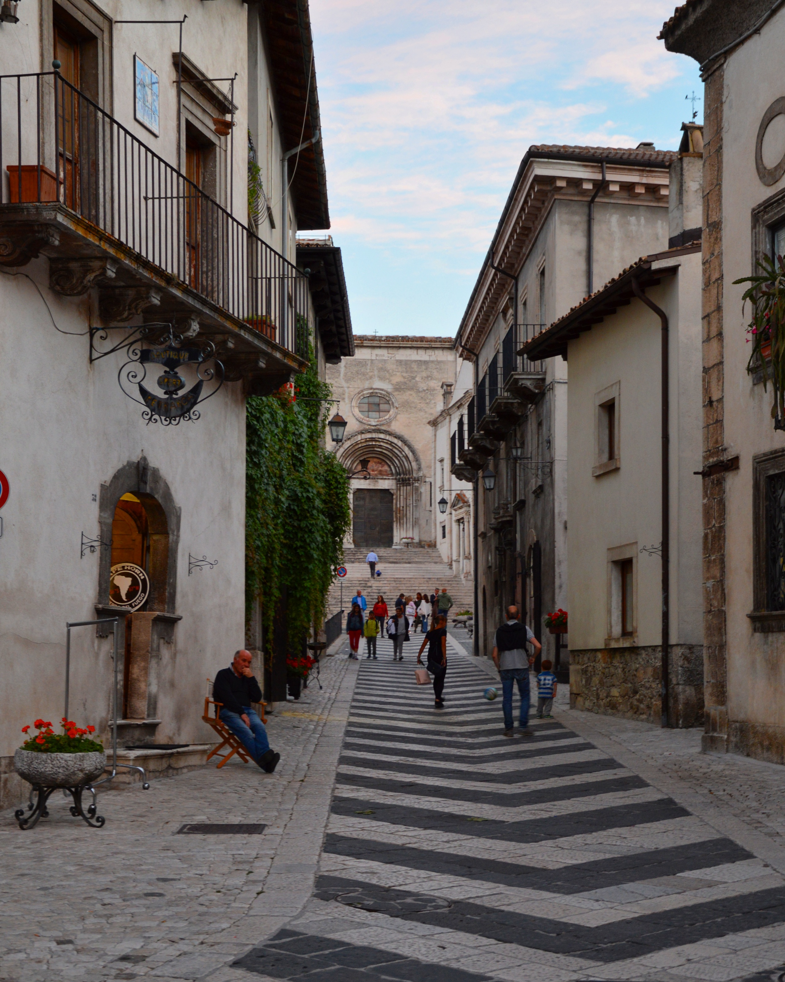 Pescocostanzo